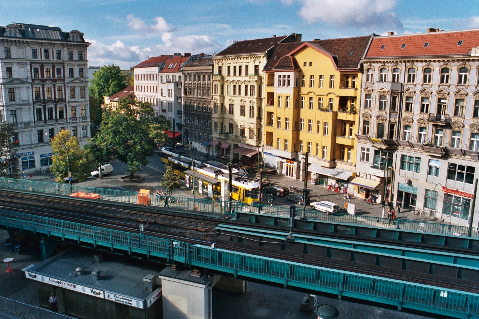 U-Bhf Eberswalder Str., Berlin-Prenzlauer Berg. Blick auf die Kastanienalle an der Ecke Schönhauser Allee